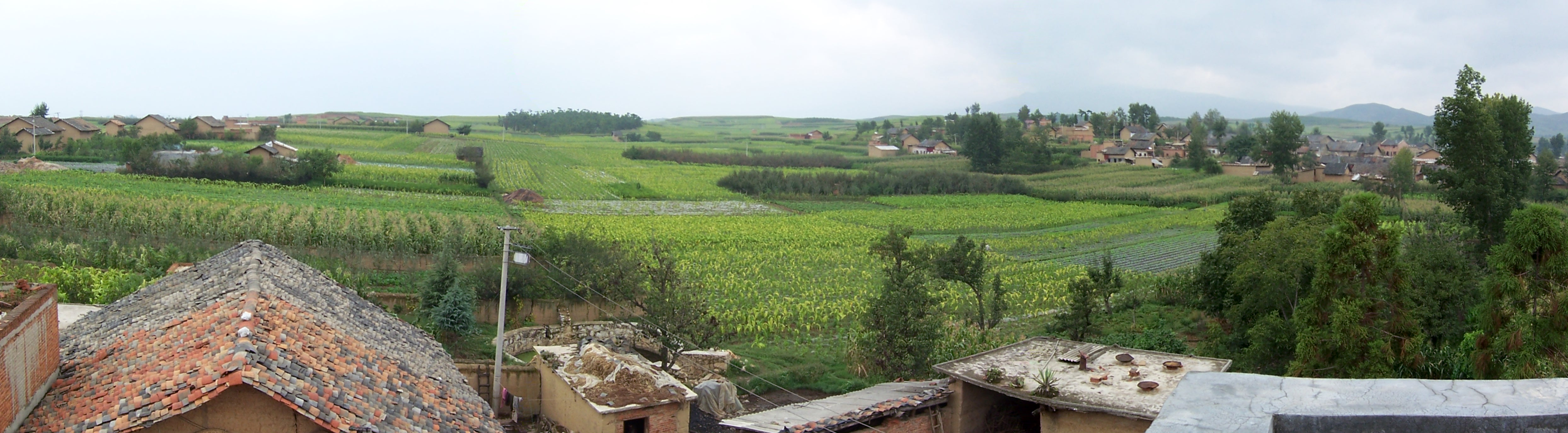 守望乡八仙村马家院子